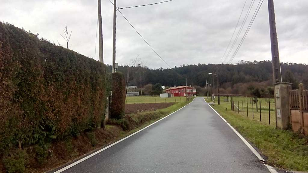 Vista de Meizoso, Pedroso, Narón.